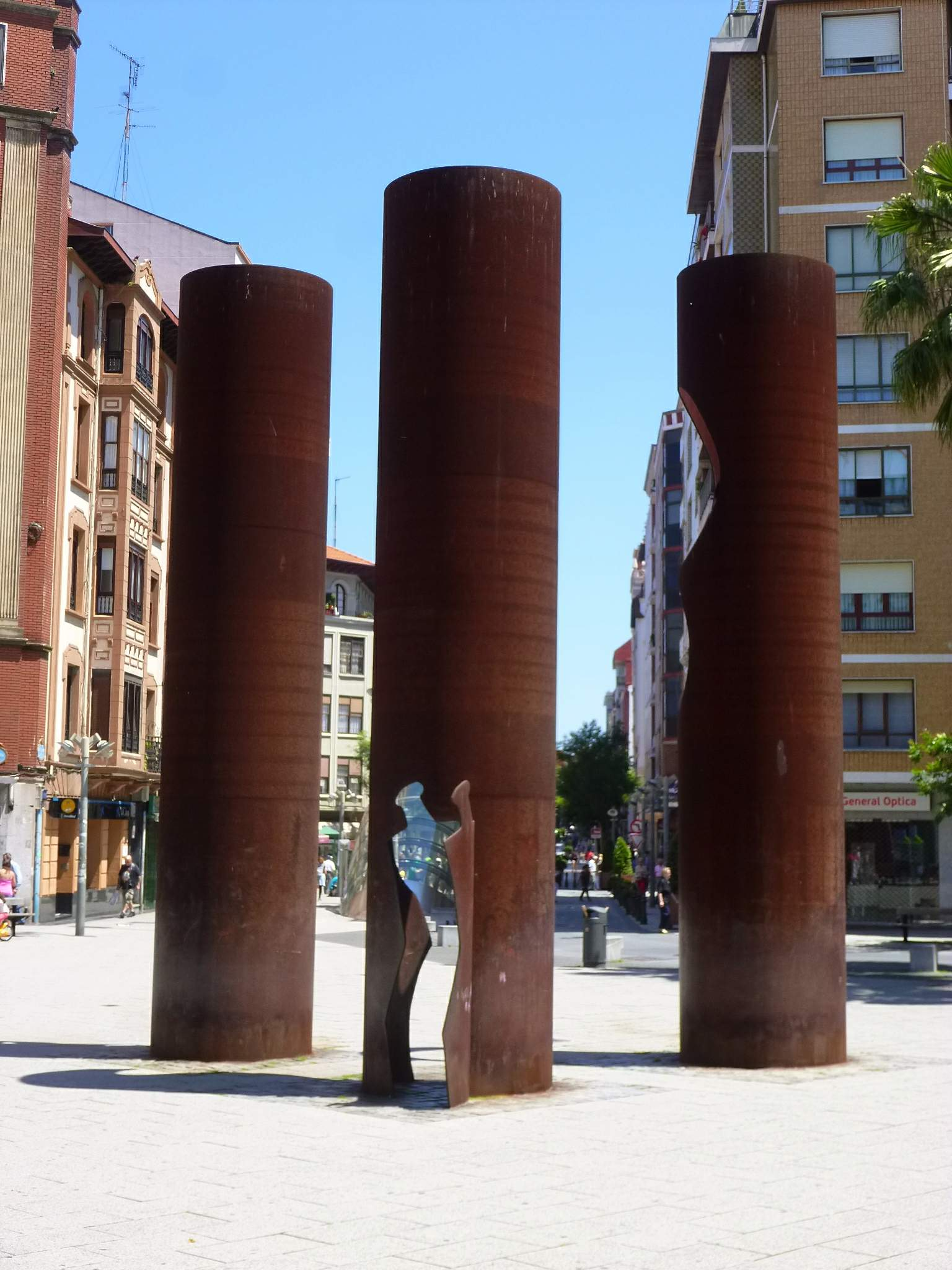 Plaza Bide Onera (Barakaldo, Bizkaia)